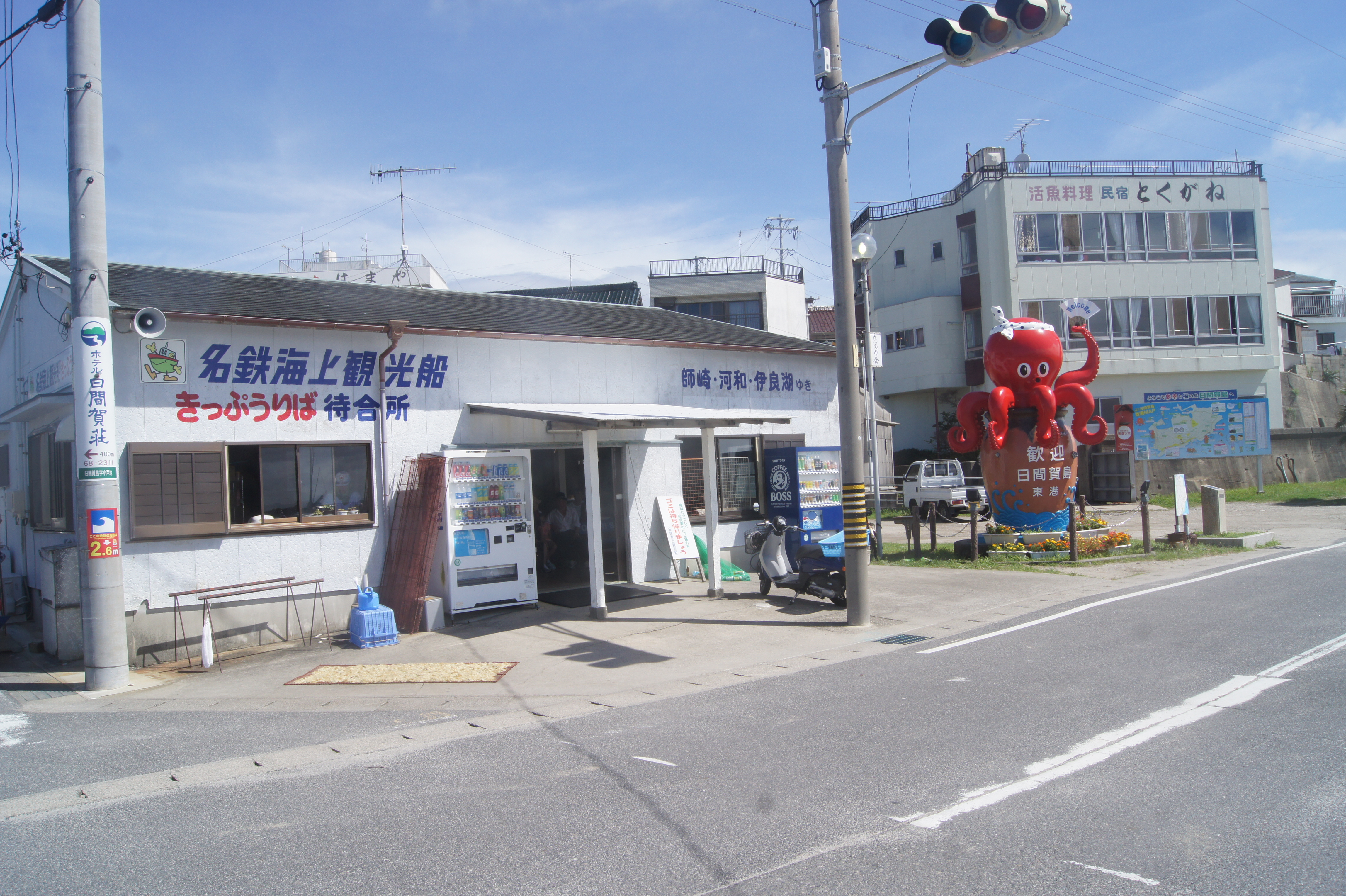 日間賀島にあるja:名鉄海上観光船の乗船券売り場